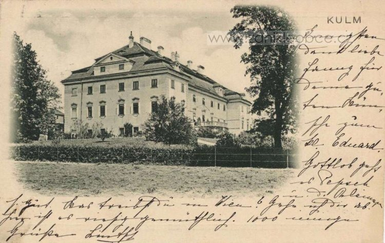 Zámek v Chlumci, pohled od studánky